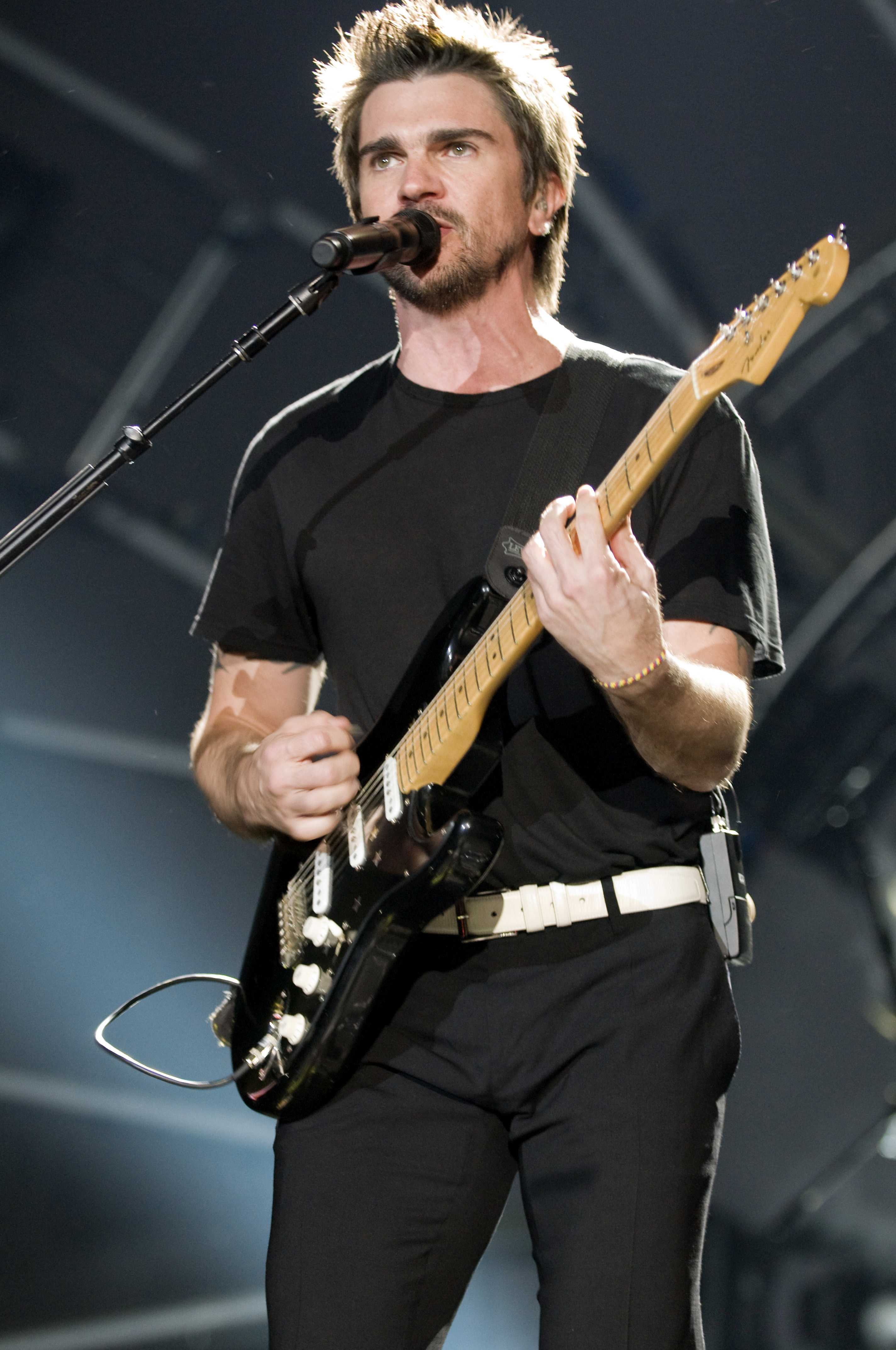 Juanes